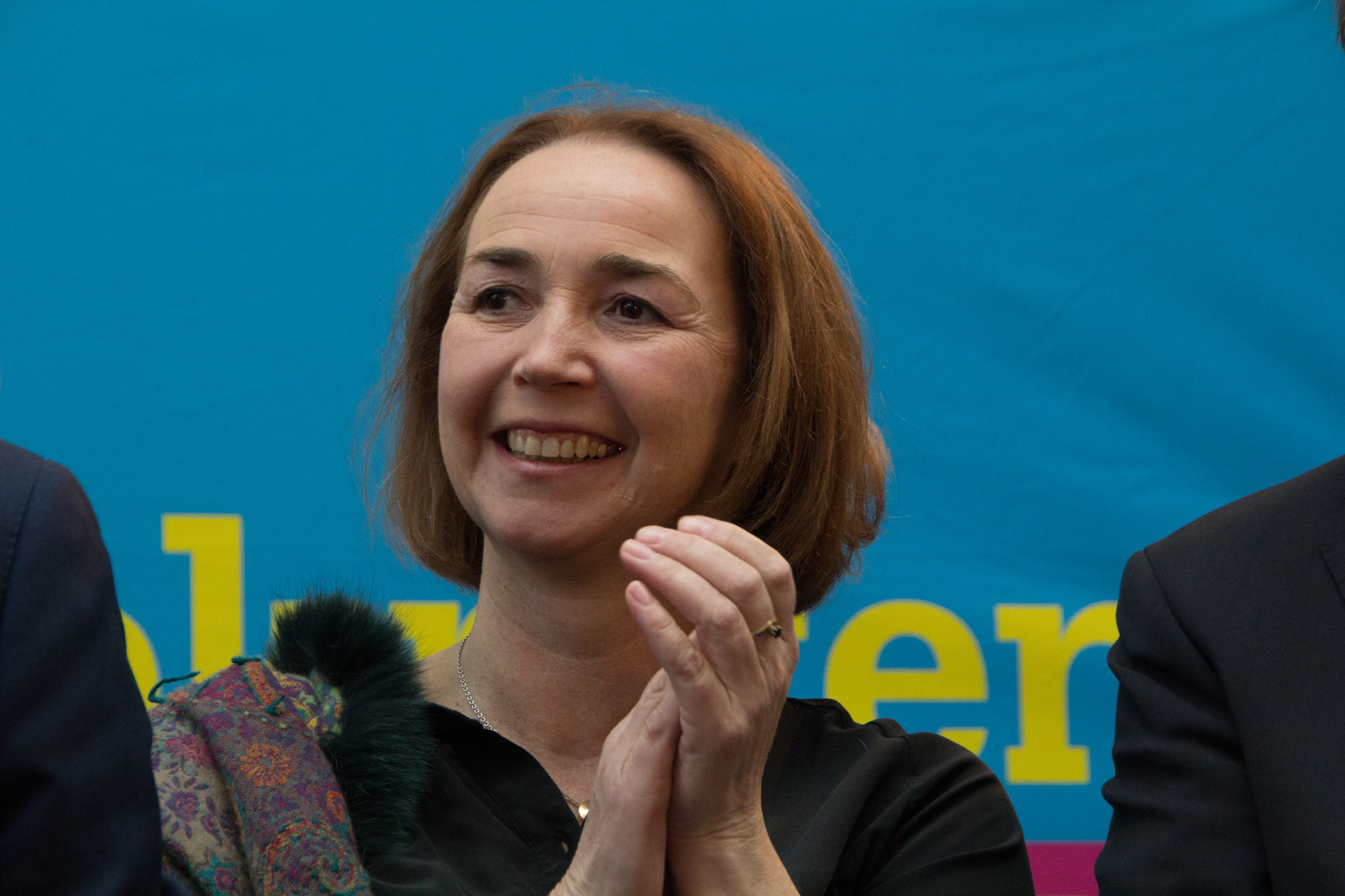 Angela Freimuth (FDP) am Wahlabend der NRW Landtagswahl am 14. Mai 2017 in Düsseldorf